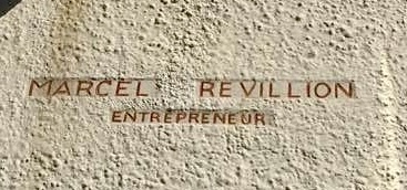 Plaque apposée sur le bâtiment nouvellement construit.